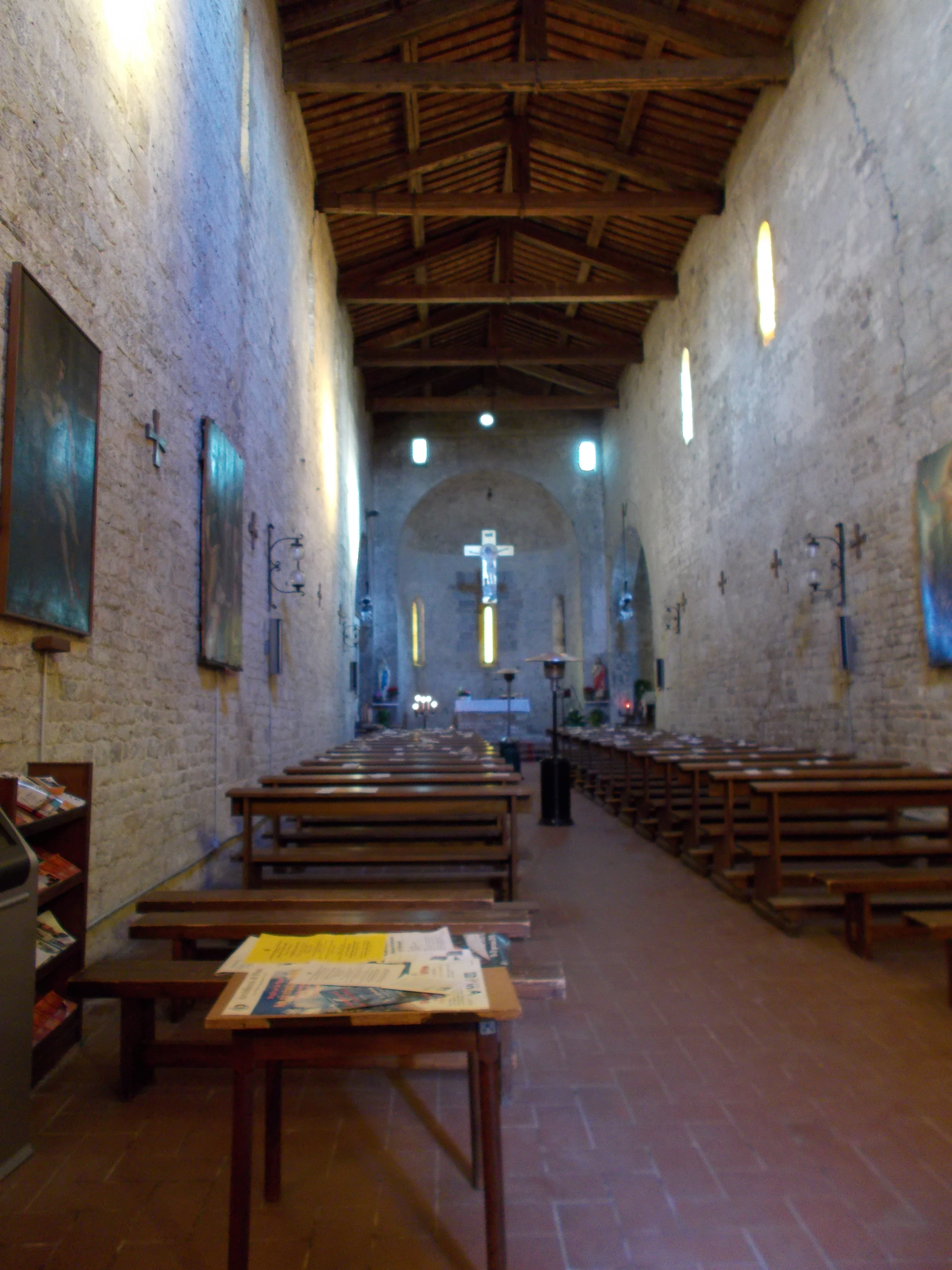 Badia San Savino, Montione, Cascina, Pisa, Italia